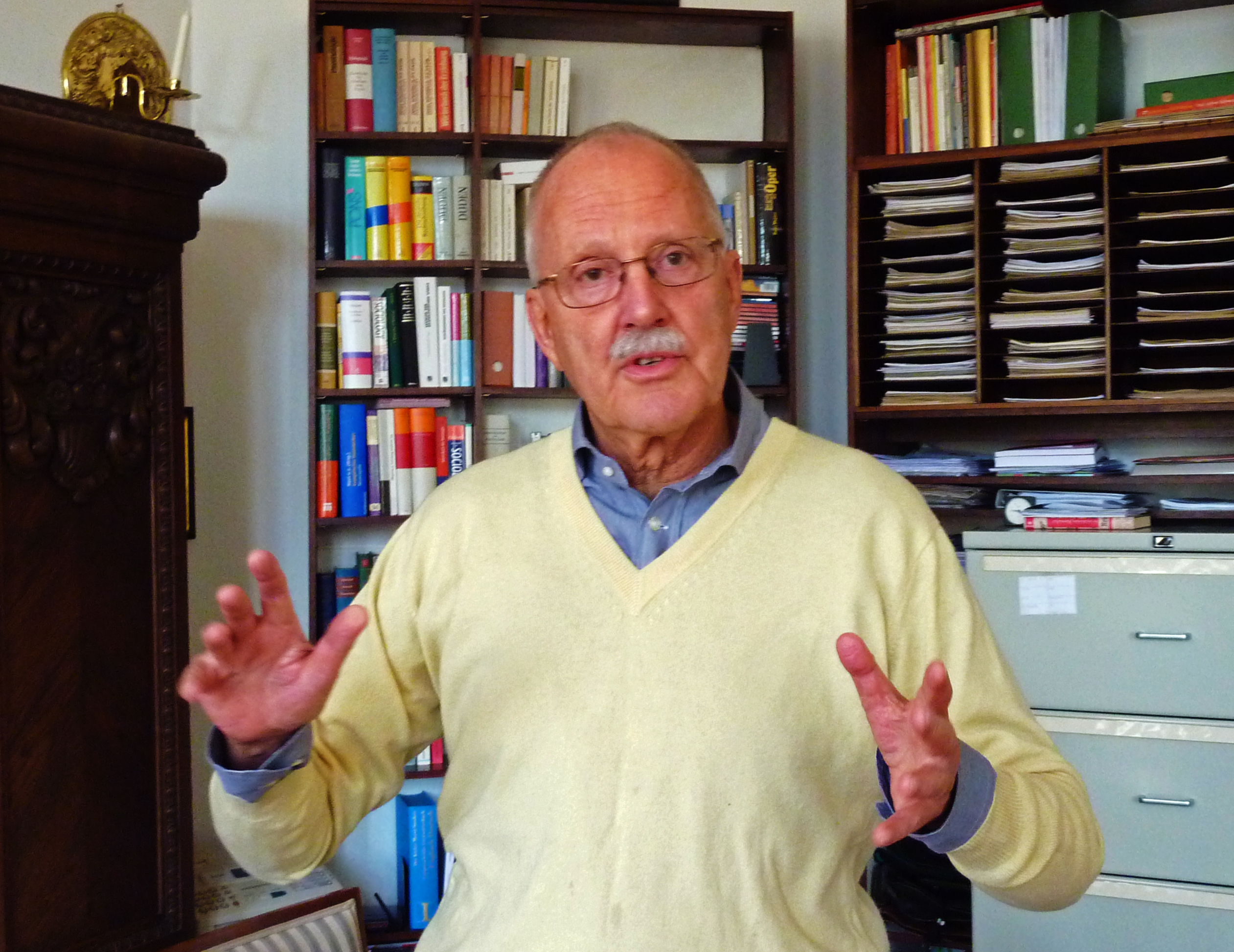 Rüdiger Lautmann in seinem Berliner Arbeitszimmer